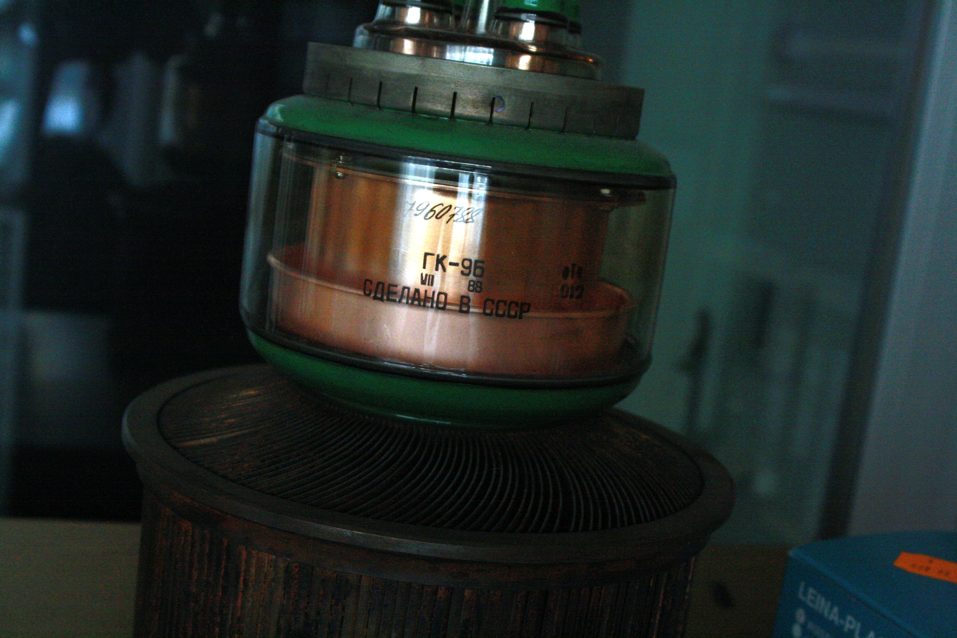 Kurzwellensendeanlage Wertachtal - Rückbau im April 2015, Russische Senderröhre GI-9B (ГИ-19Б), Ausstellungstück, (Hersteller: Контакт (Contact))